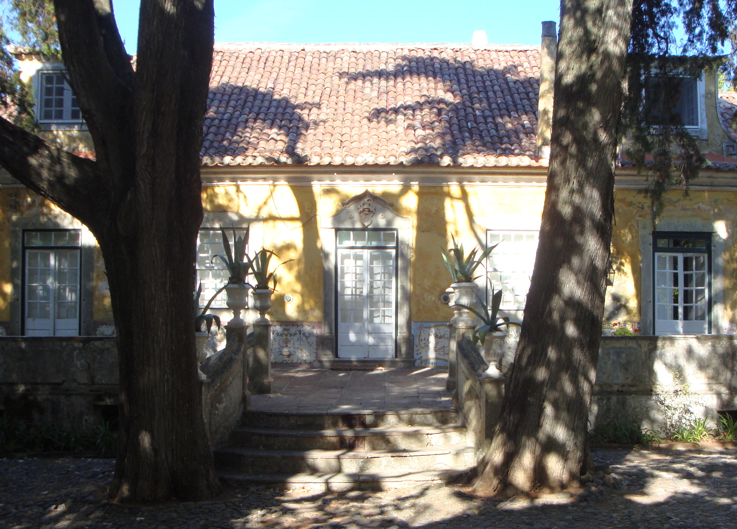 Fachada do solar da Quinta das Machadas, concelho de Setúbal.